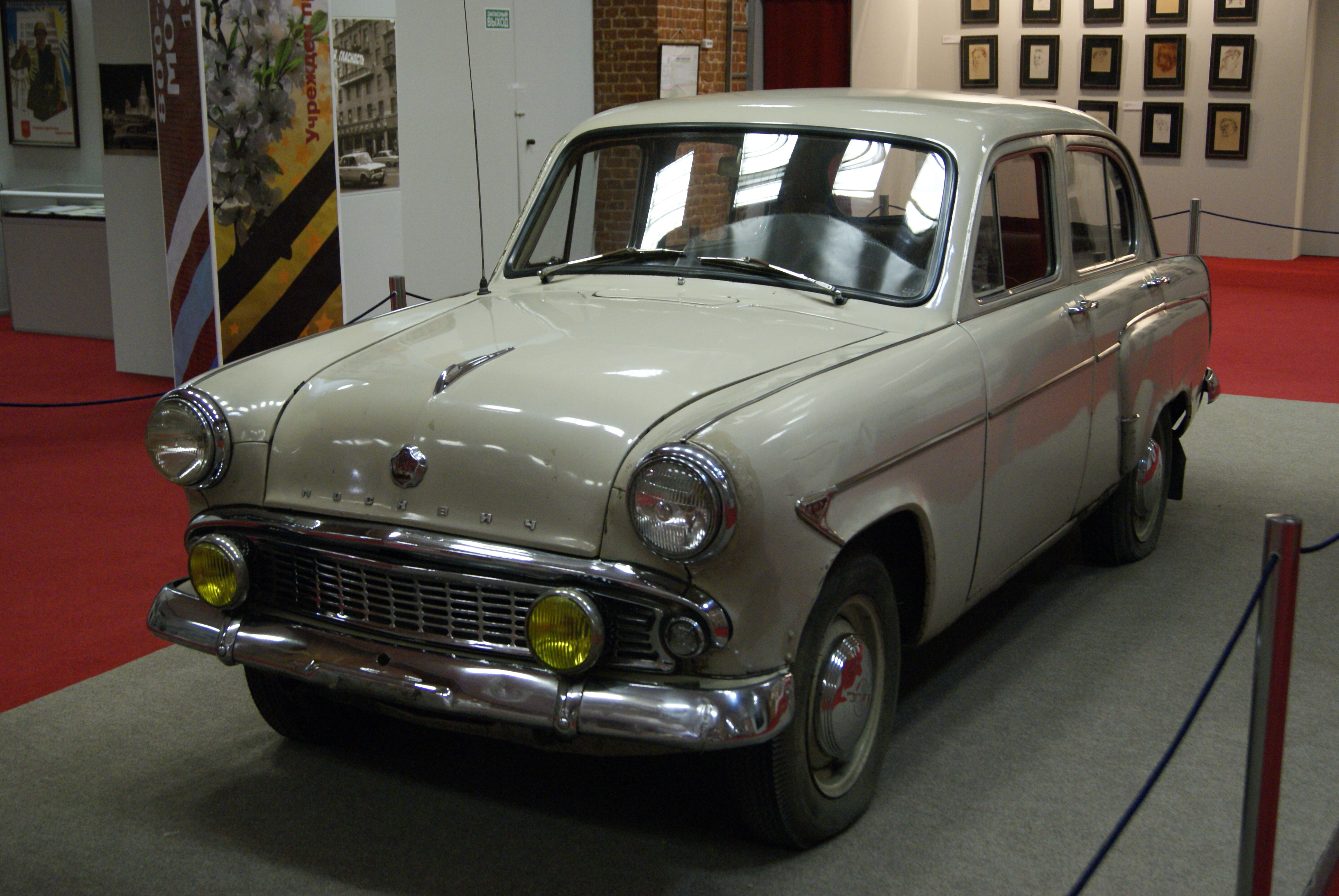 Moskvitch 403